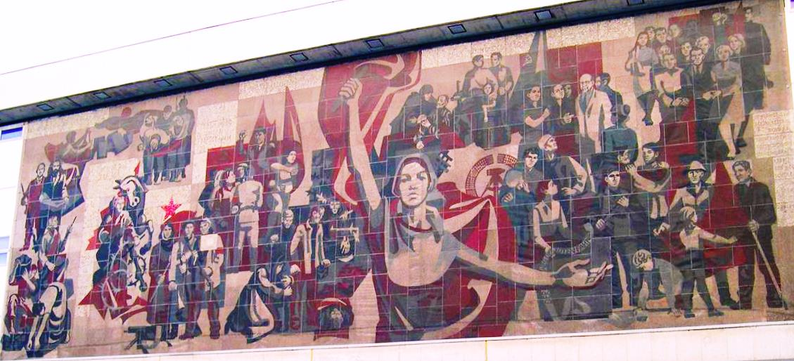 Kulturpalast Dresden Wandbild "Der Weg der Roten Fahne"